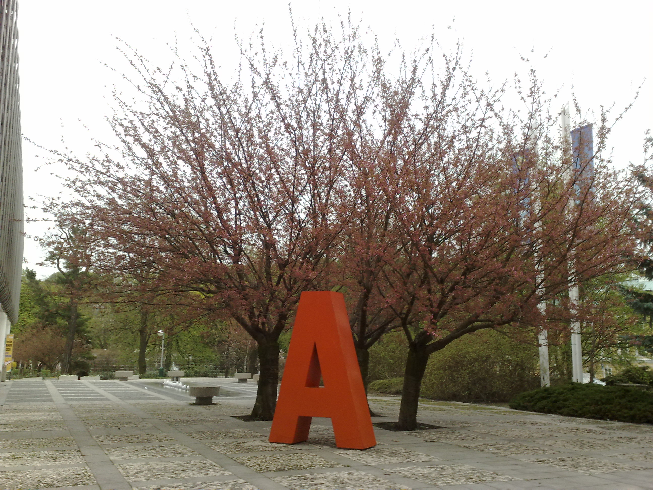 Animefest roku 2013, v Teplicích.